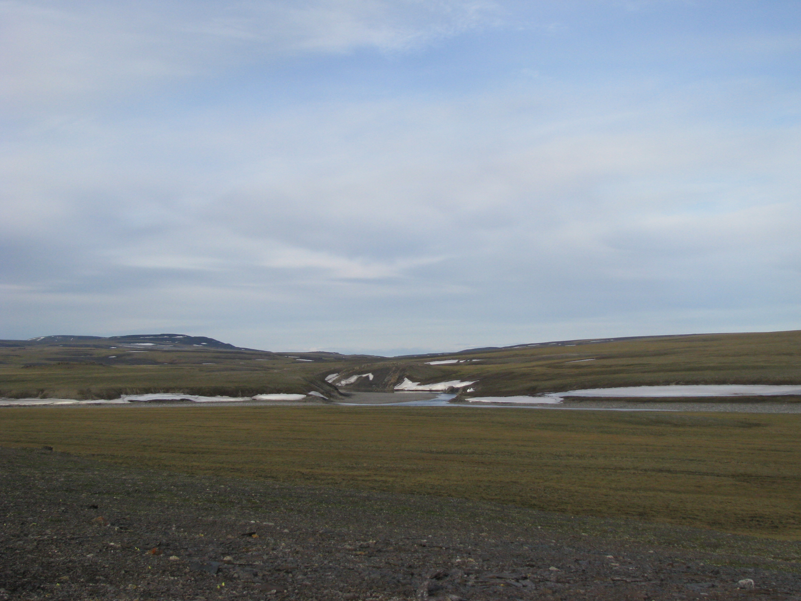 Leningradskaja River, Barkova River mouth, Река Ленинградская, усте р. Баркова